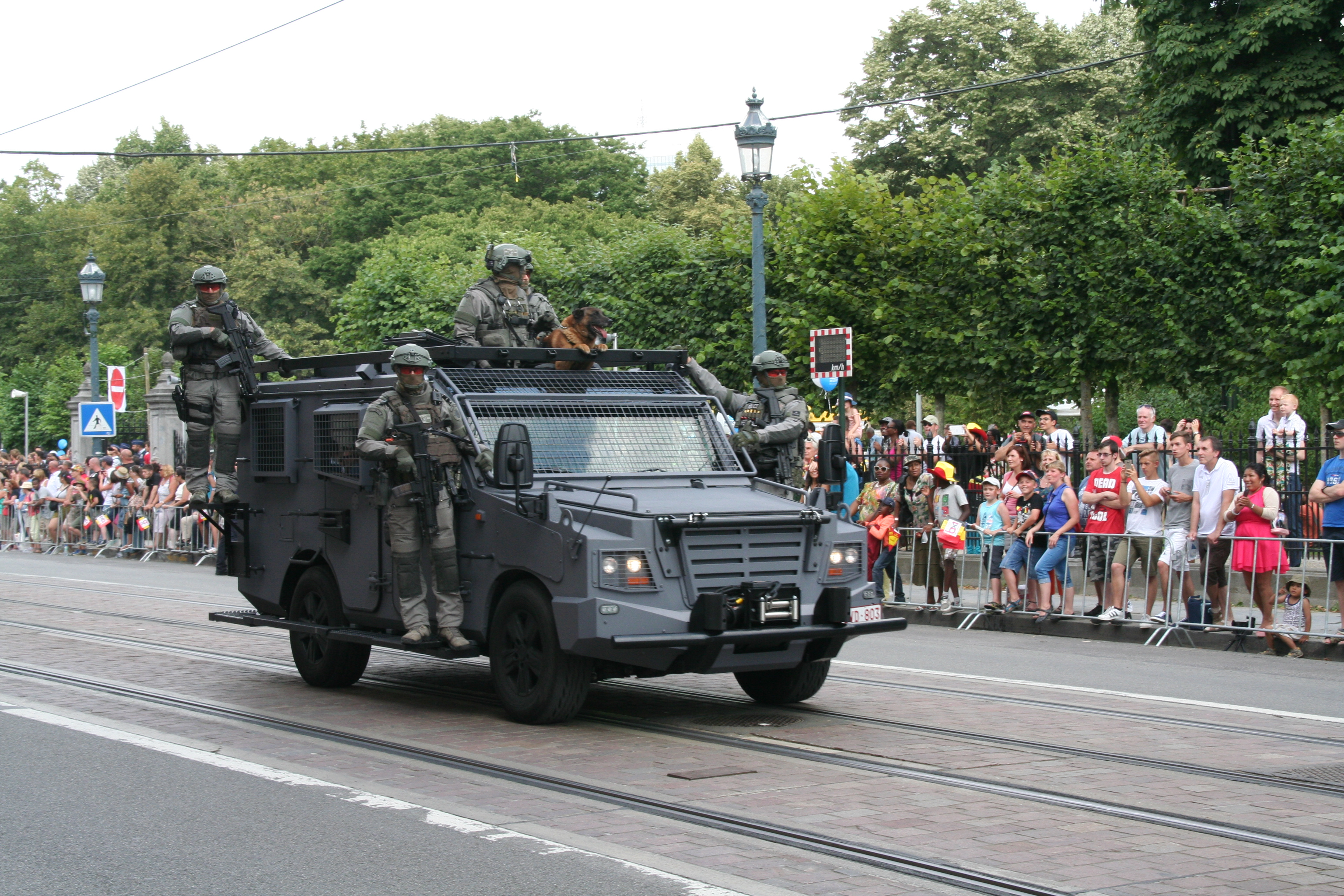 Fête nationale belge à Bruxelles le 21 juillet 2016 - Véhicule de la police belge 04 - CGSU - Unités spéciales de la police belge lors du défilé